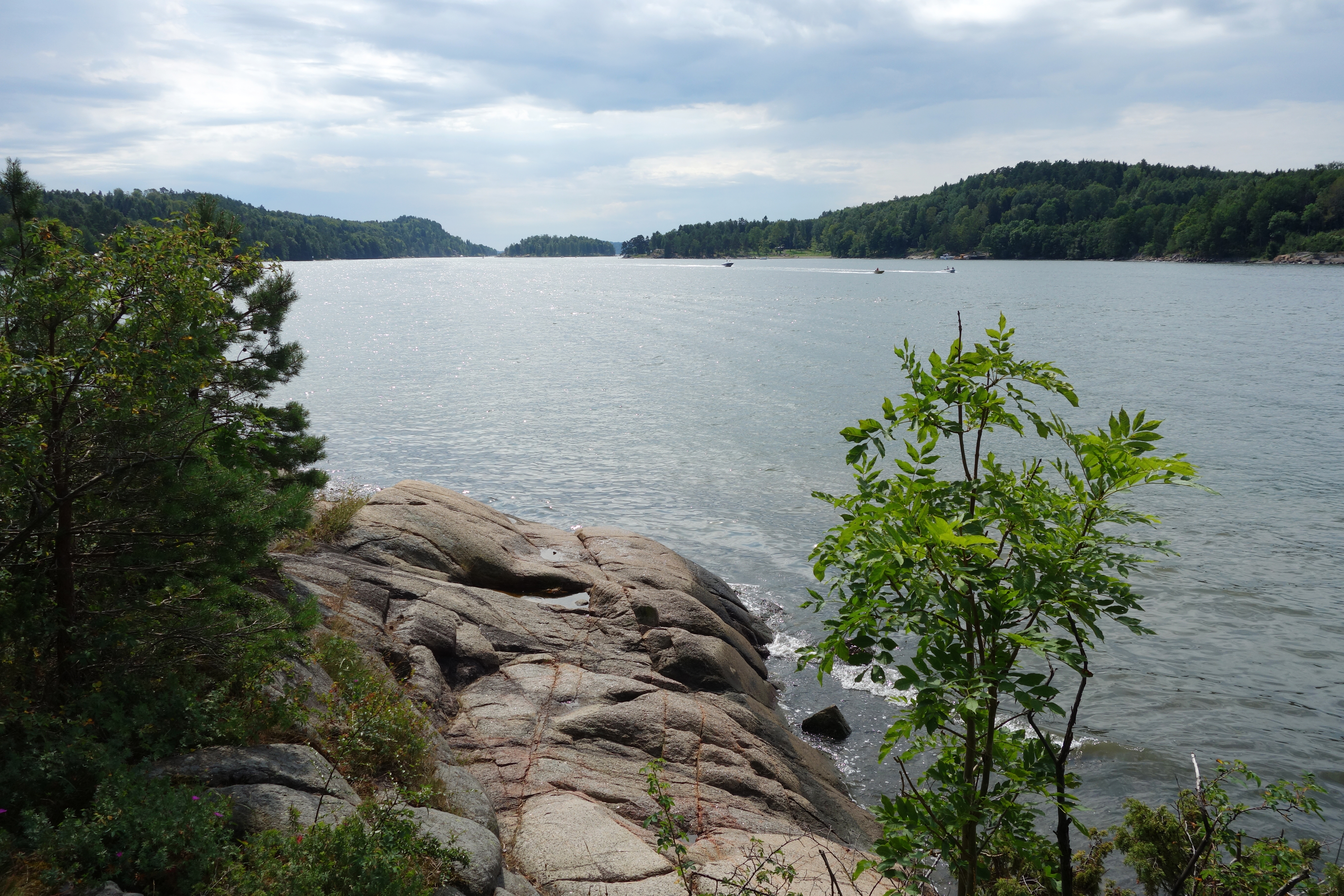 Vestfjorden sett fra Nøtterøy i Vestfold